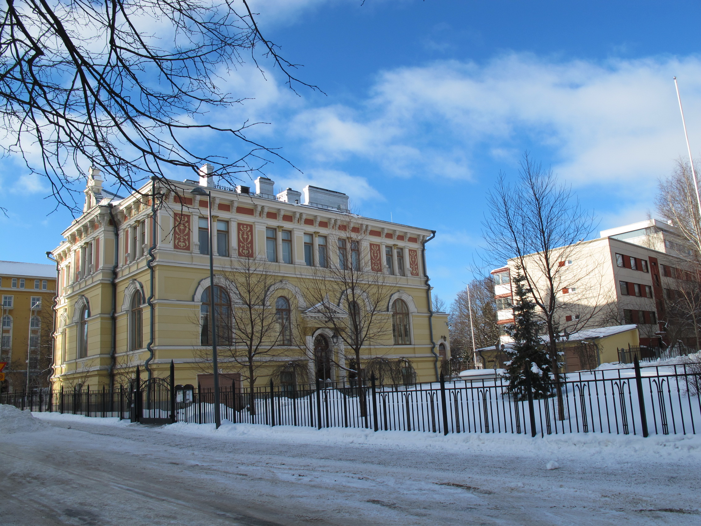 Pikkupalatsi_Heli Haavisto